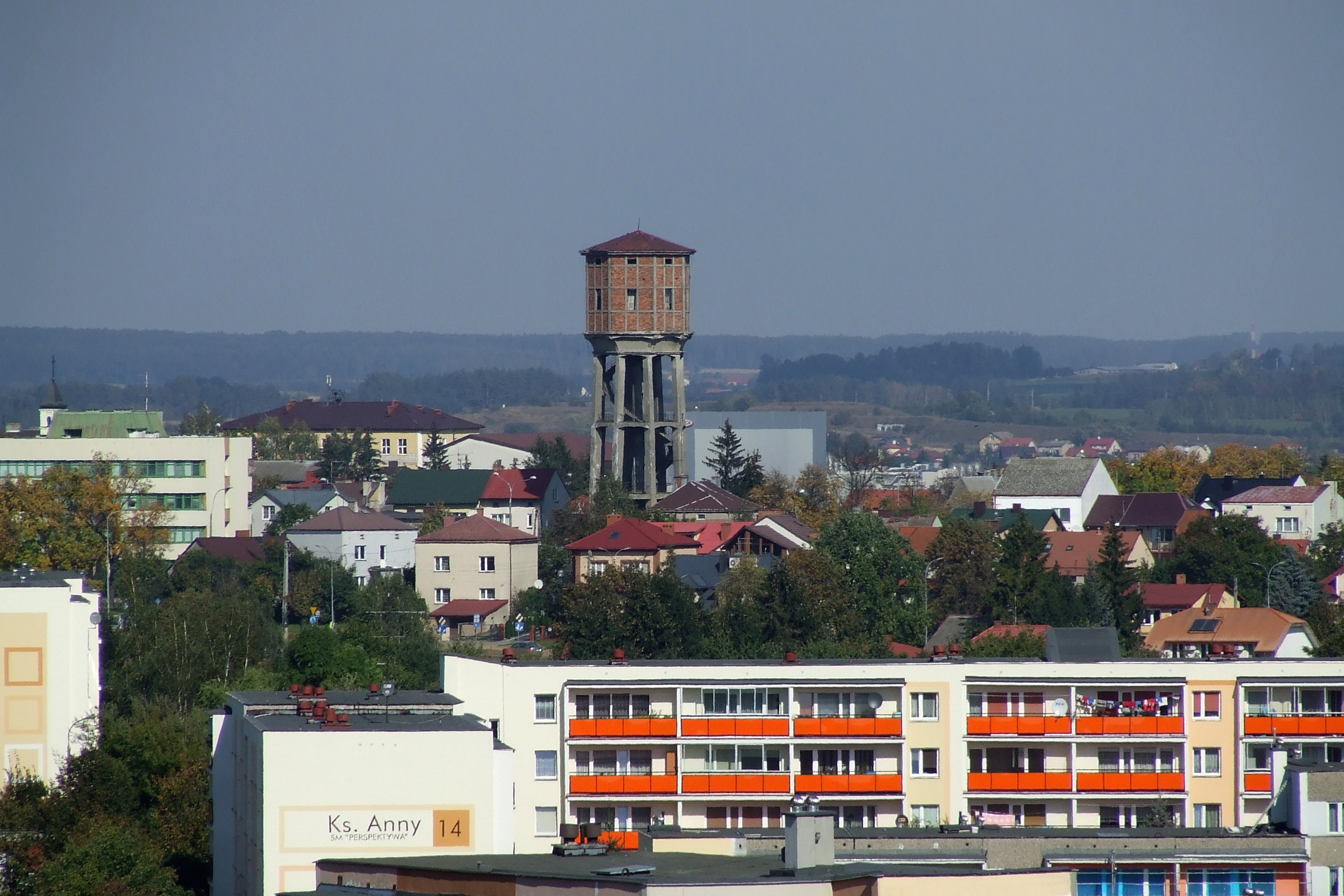 Wieża ciśnień w Łomży - widok z dachu bloku (ul. Porucznika Łagody 3)